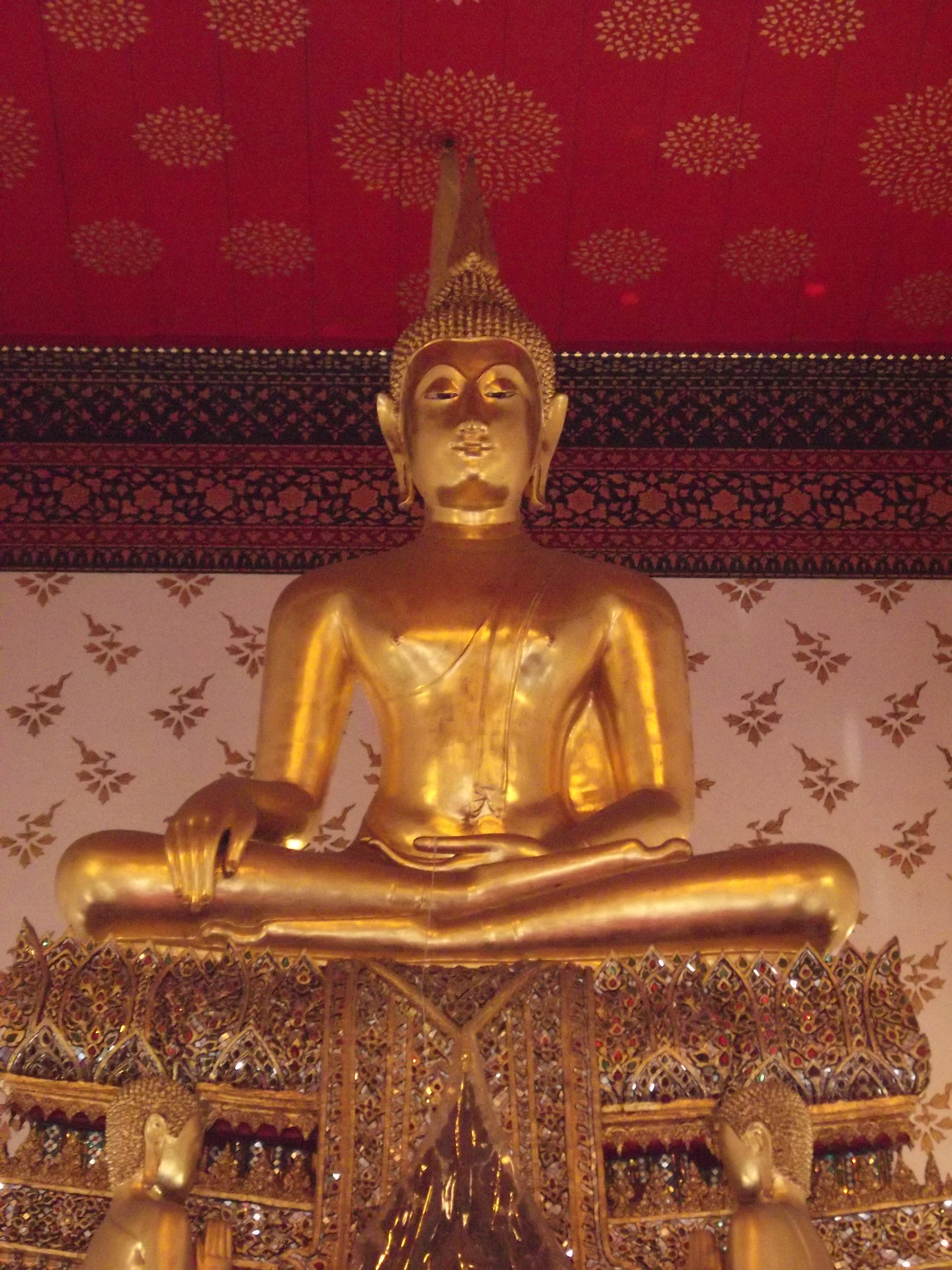 วัดหนัง